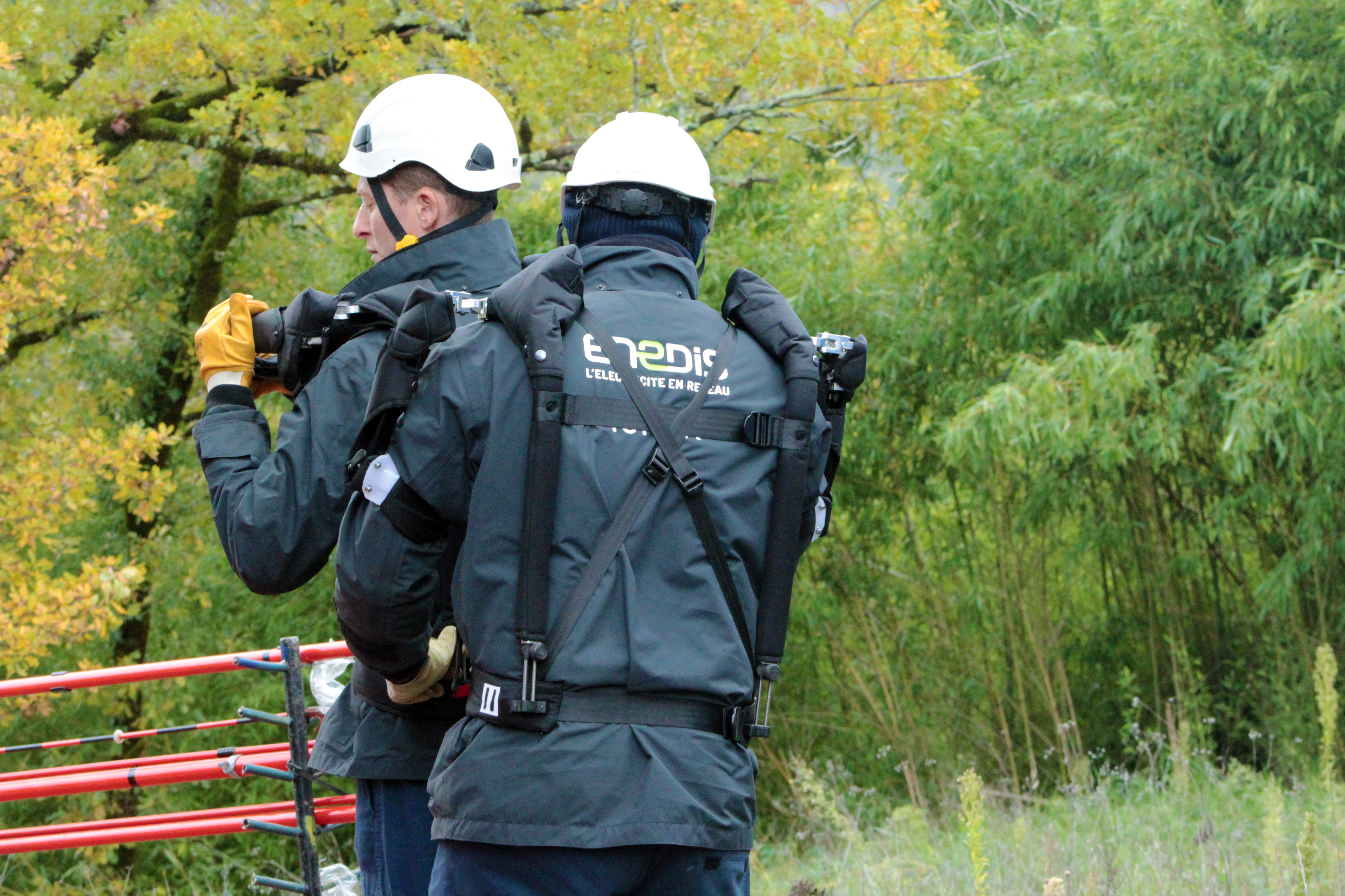 Exosquelette Plum'Mobility 100% mécanique et spécifique au travail des bras en hauteur. Conçu par HMT (Human Mechanical Technologies). Présentation de la solution aux équipes TSTHTA (Travail Sous Tension - Haute Tension A) d'Enedis.